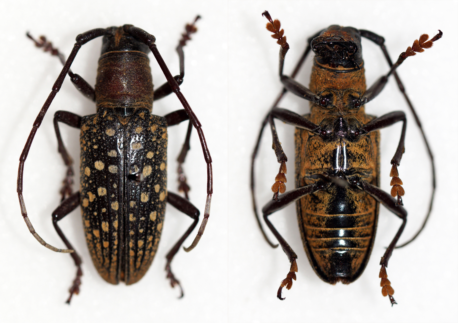 Breuning,1944 Sex: Female Data: 03-2014 - Esperanza agusan - del norte - Mindanao - Philippines Size: ?